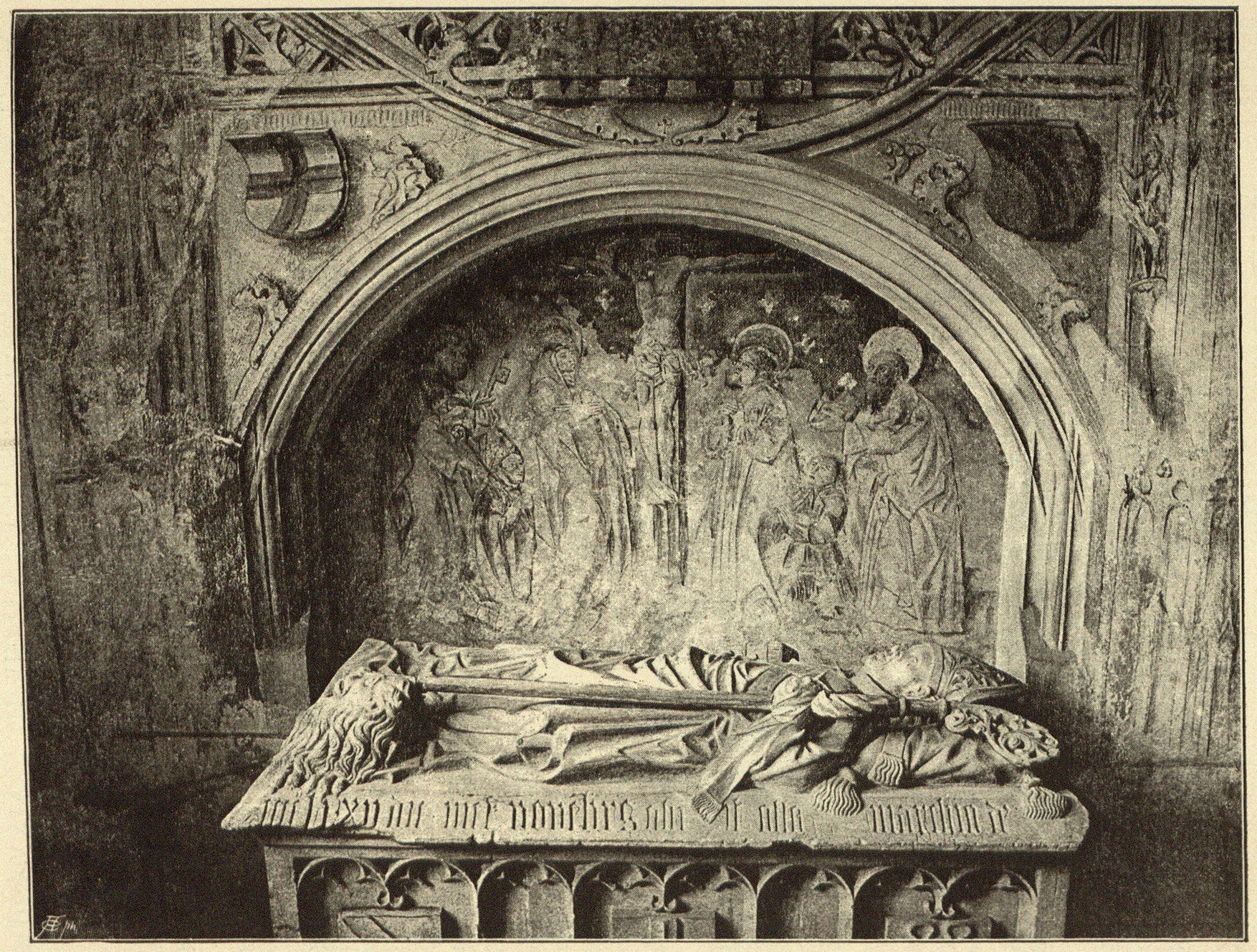 Konstanz, Münster, Grabmal des Markgrafen Otto von Hochberg Abbildung aus: Franz Xaver Kraus: Die Kunstdenkmäler des Grossherzogthums Baden. Band 1: Die Kunstdenkmäler des Kreises Konstanz. Freiburg i. Br. 1887